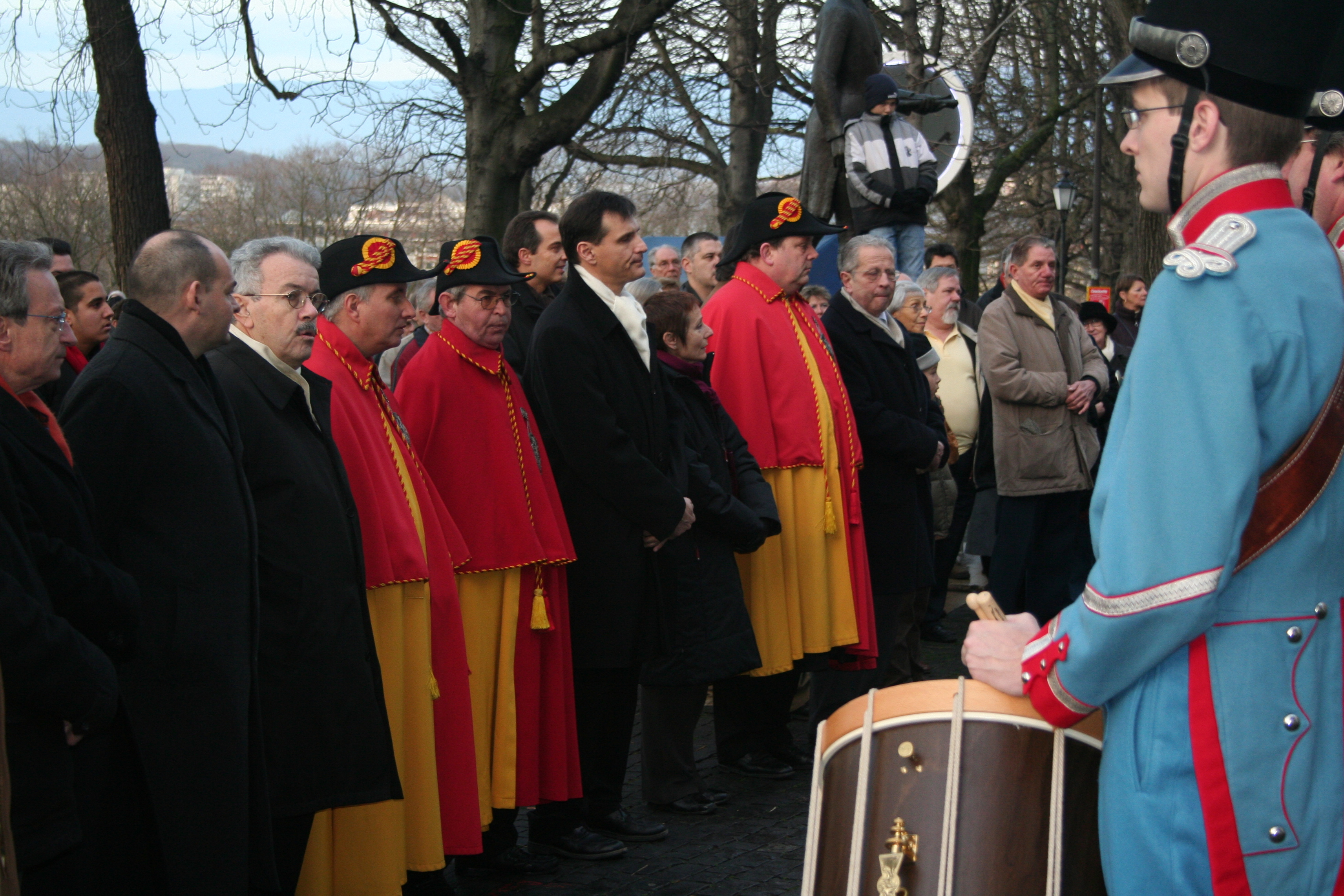 Les autorités cantonales genevoises devant le Corps de musique de Landwehr (Harmonie officielle de l'Etat de Genève) pendant la commémoration de la Restauration genevoise.